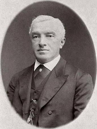 Алексеев Сергей Владимирович (1836-1893) - отец К.С.Алексеева (Станиславского).